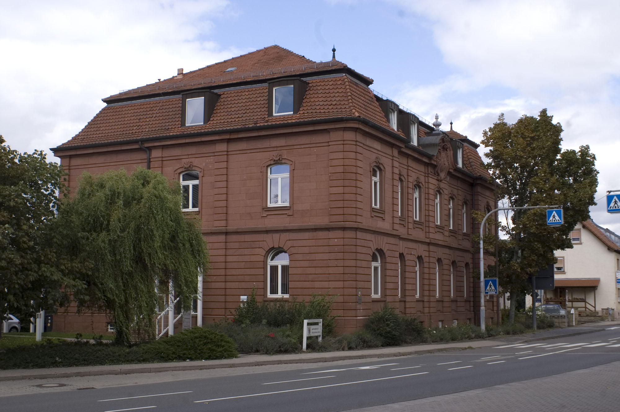 Kreuznacher Straße 37: Amtsgericht; neubarocker Sandsteinquaderbau mit Mansardwalmdach, bezeichnet 1900, Architekt Theodor Bente, Kaiserslautern; straßenbildprägend